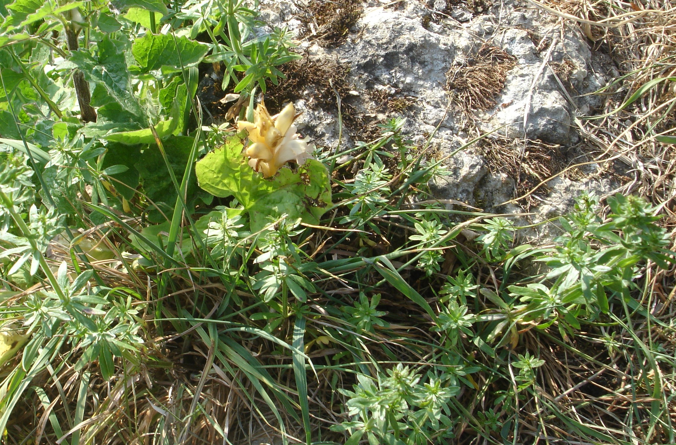 Labkraut-Würger (Orobanche caryphyllacea) ohne Blattgrün in der Mitte des Bildes ernährt sich durch unterirdischen Parasitismus vom Labkraut (Galium sp.)